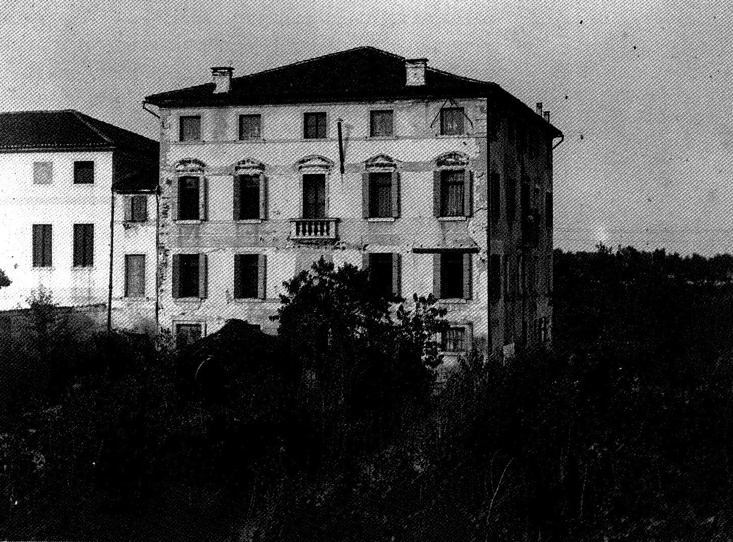 Patronato PioX